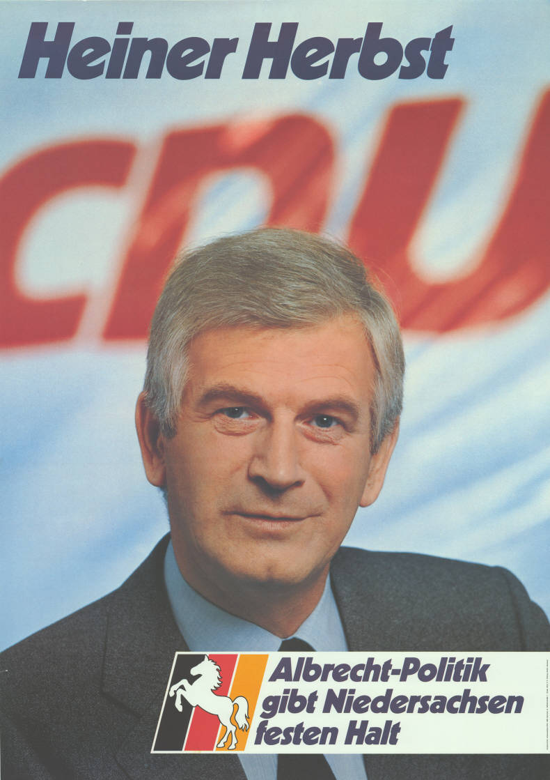 Heiner Herbst CDU Albrecht-Politik gibt Niedersachsen festen Halt Abbildung: Porträtfoto - Nationalfarben mit Niedersachsenross Plakatart: Kandidaten-/Personenplakat mit Porträt Auftraggeber: Verantw.: Niedersachsen-CDU, Hannover Drucker_Druckart_Druckort: Willy F.P. Fehling GmbH, Hannover Objekt-Signatur: 10-008 : 490 Bestand: Landtagswahlplakate Niedersachsen (10-008) GliederungBestand10-18: Landtagswahlplakate Niedersachsen (10-008) » CDU Lizenz: KAS/ACDP 10-008 : 490 CC-BY-SA 3.0 DE